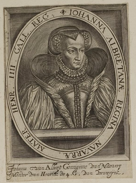 Grafik aus dem Klebeband Nr. 1 der Fürstlich Waldeckschen Hofbibliothek Arolsen Motiv: Johanna von Albret, Mutter des französischen Königs Heinrich IV.